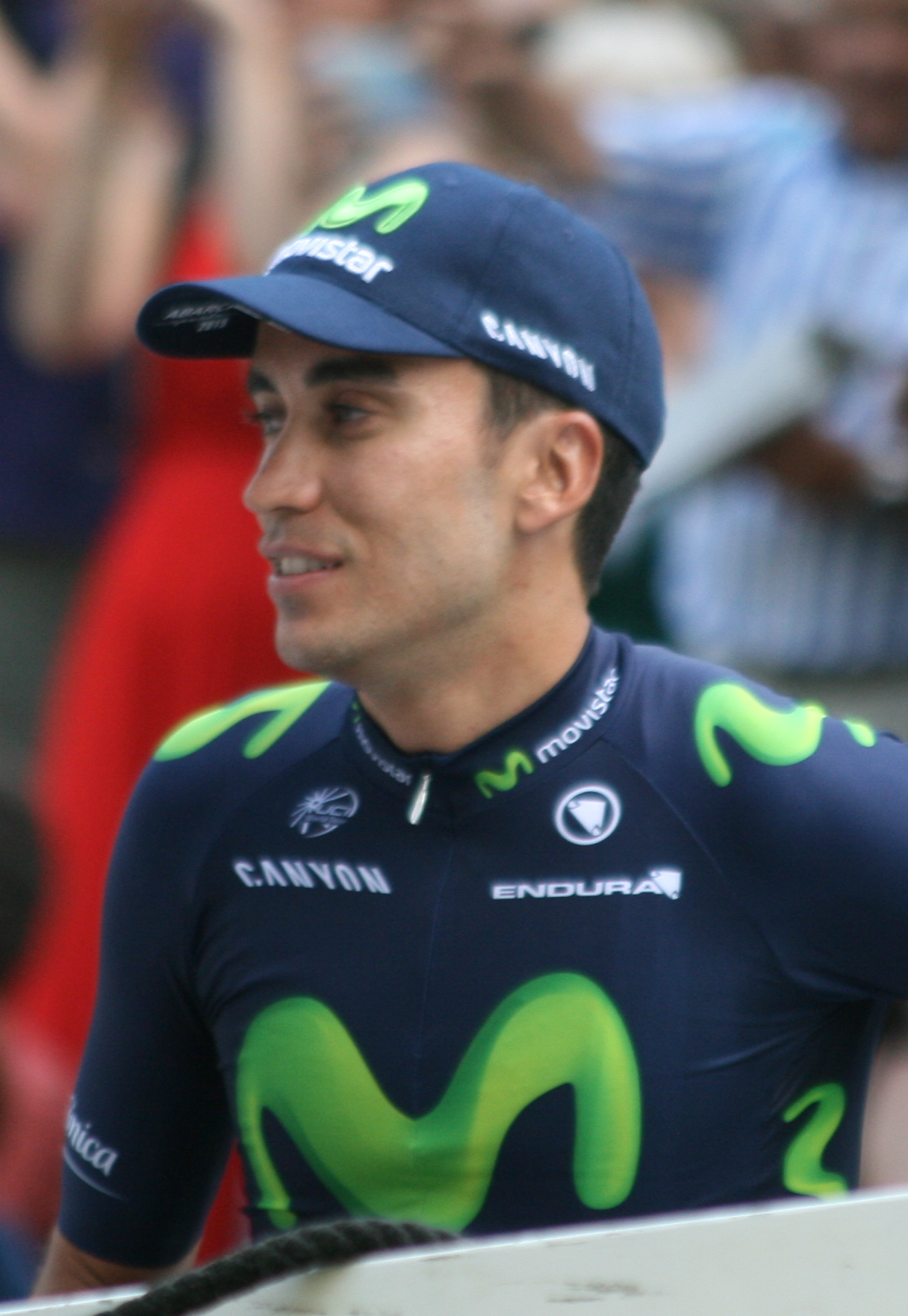 ploegenpresentatie Tour de France 2015 Utrecht